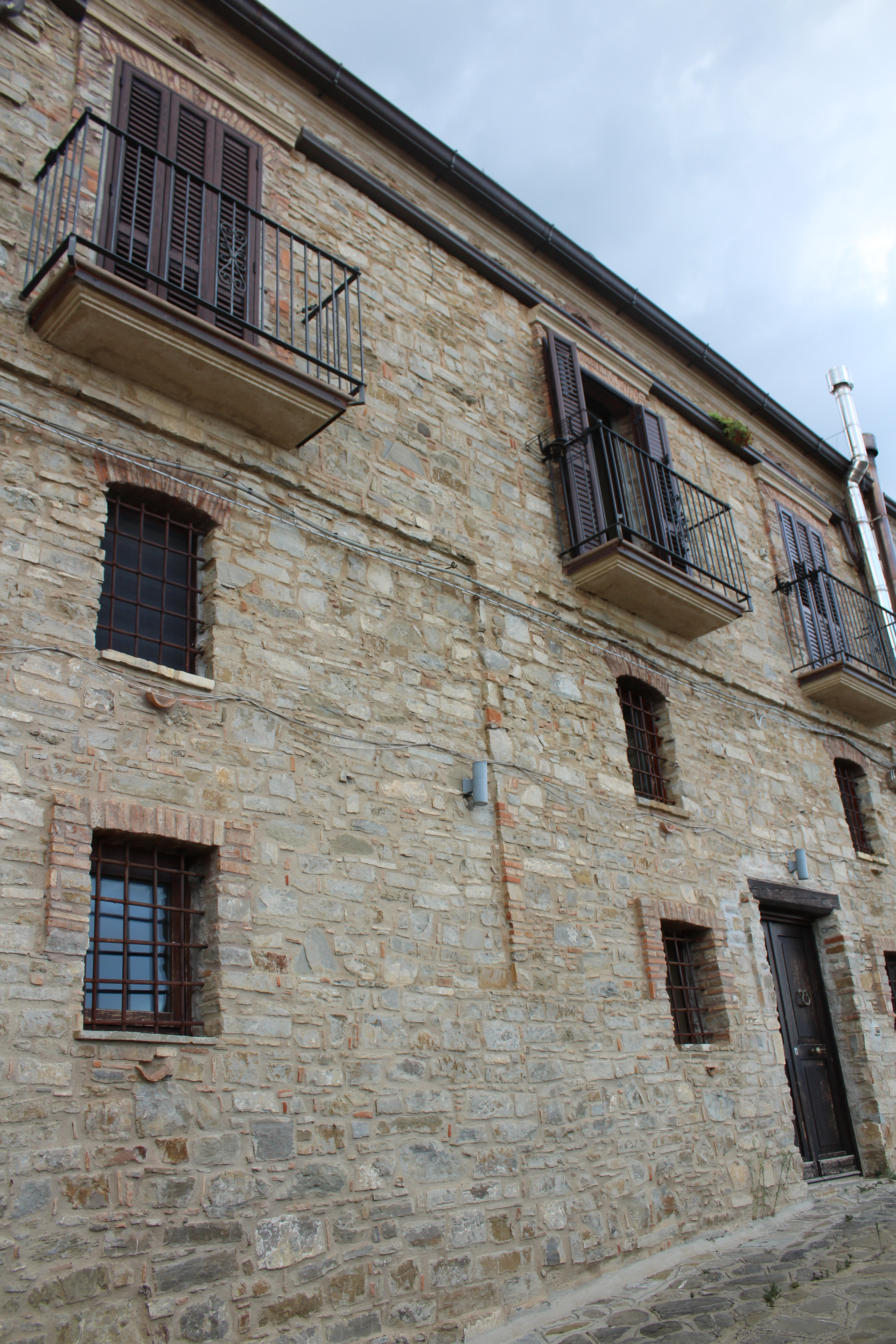 Palazzo Scillone (Albidona)